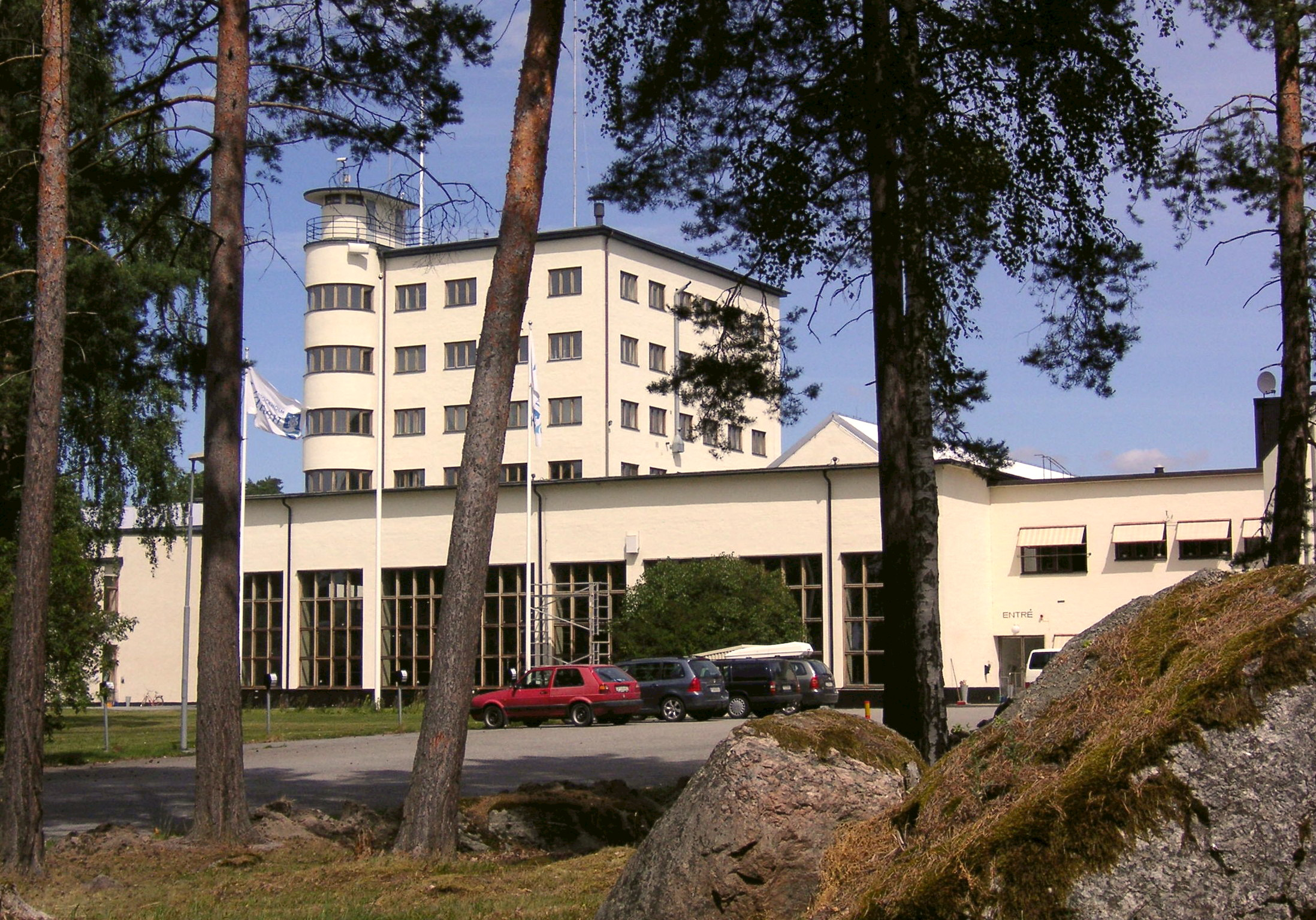 "Lovö vattenverk" på Lovön, Stockholms län (arkitekt Paul Hedqvist)